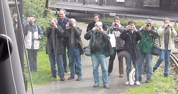 Teilausschnitt des von User Qualle hochgeladenen File:Koeln Trainspotters.jpg